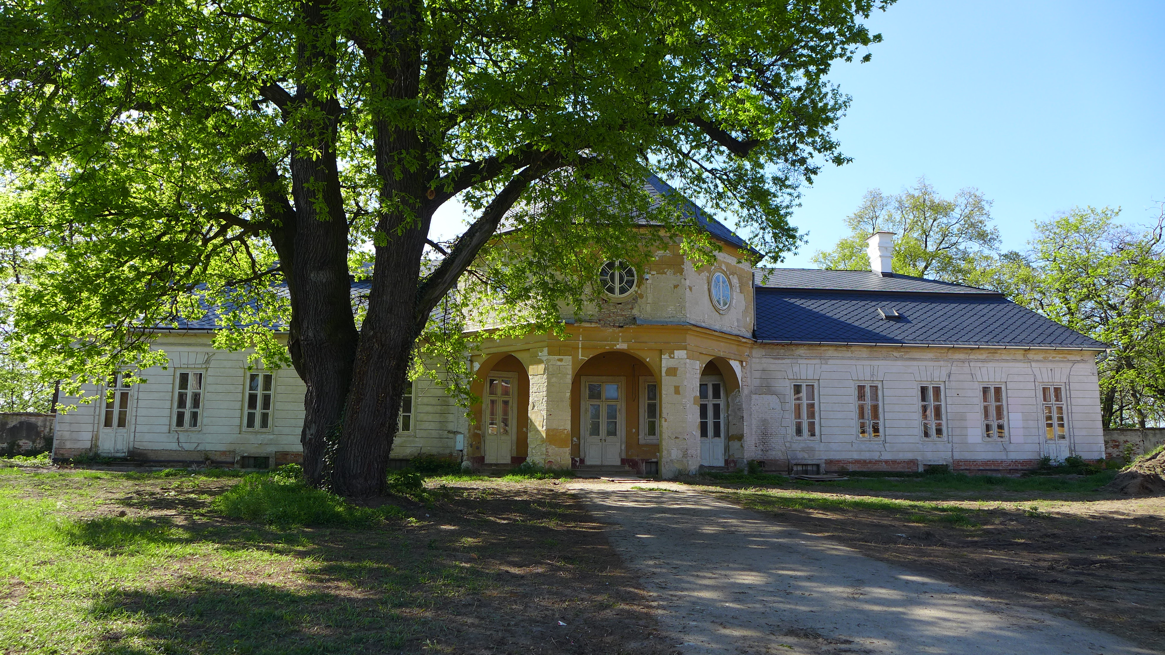 Zámek Belvedere, Valtice 359, Valtice.